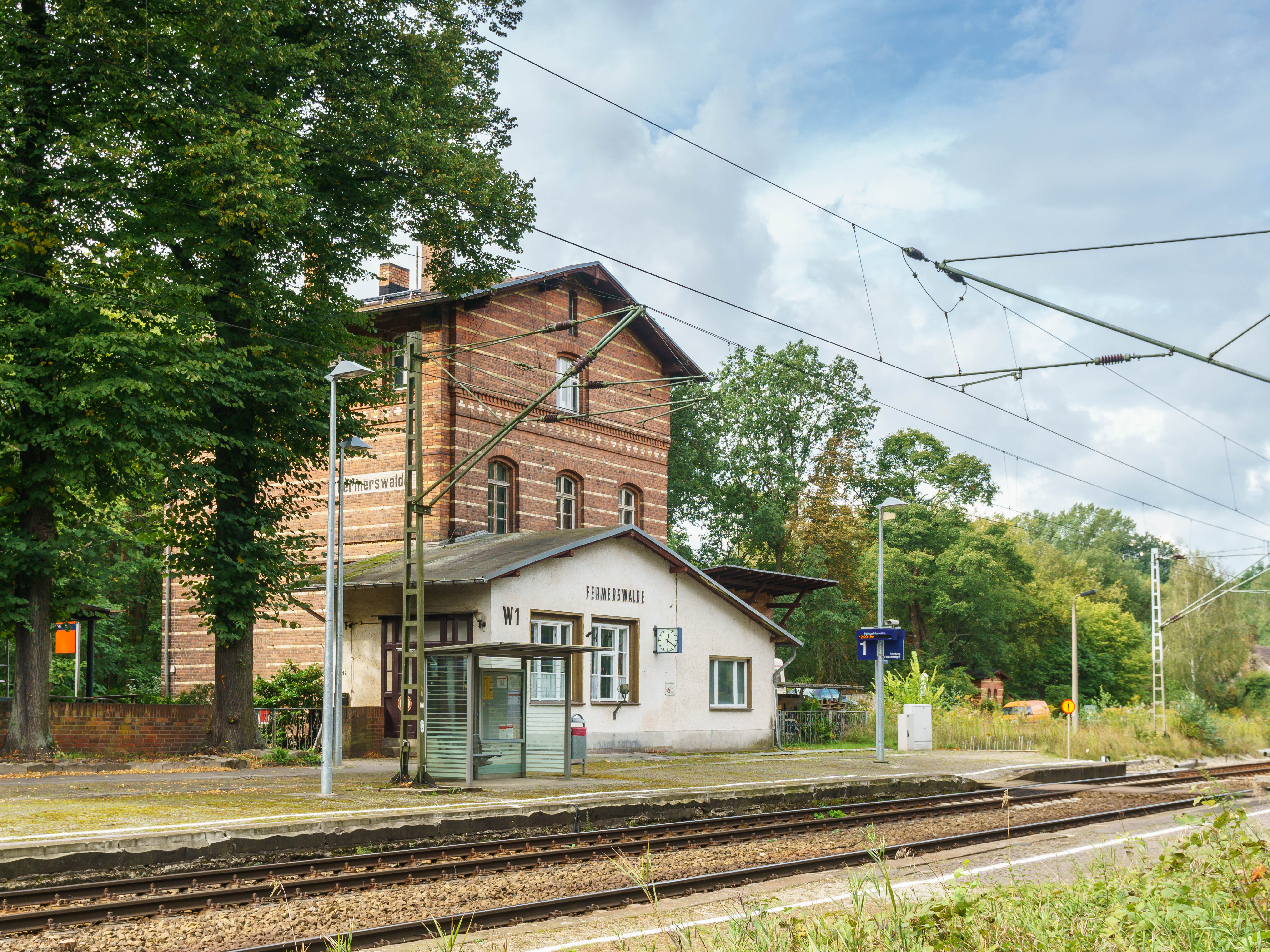 Empfangsgebäude Bahnhof Fermerswalde, Am Fermerswalder Bahnhof 12 in Herzberg OT Fermerswalde